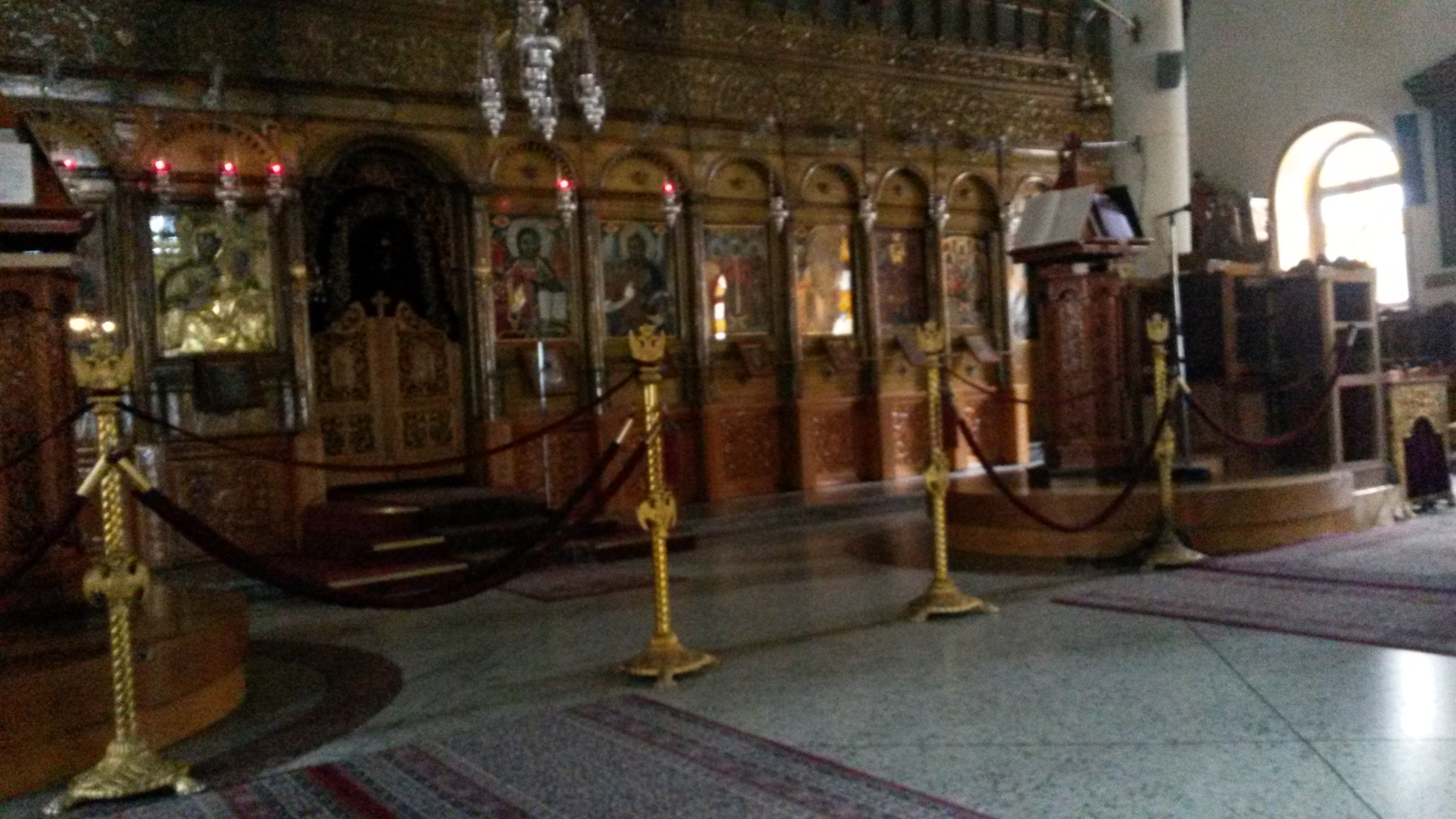 Εσωτερική όψη της Αγίας Τράπεζας του Ναού.